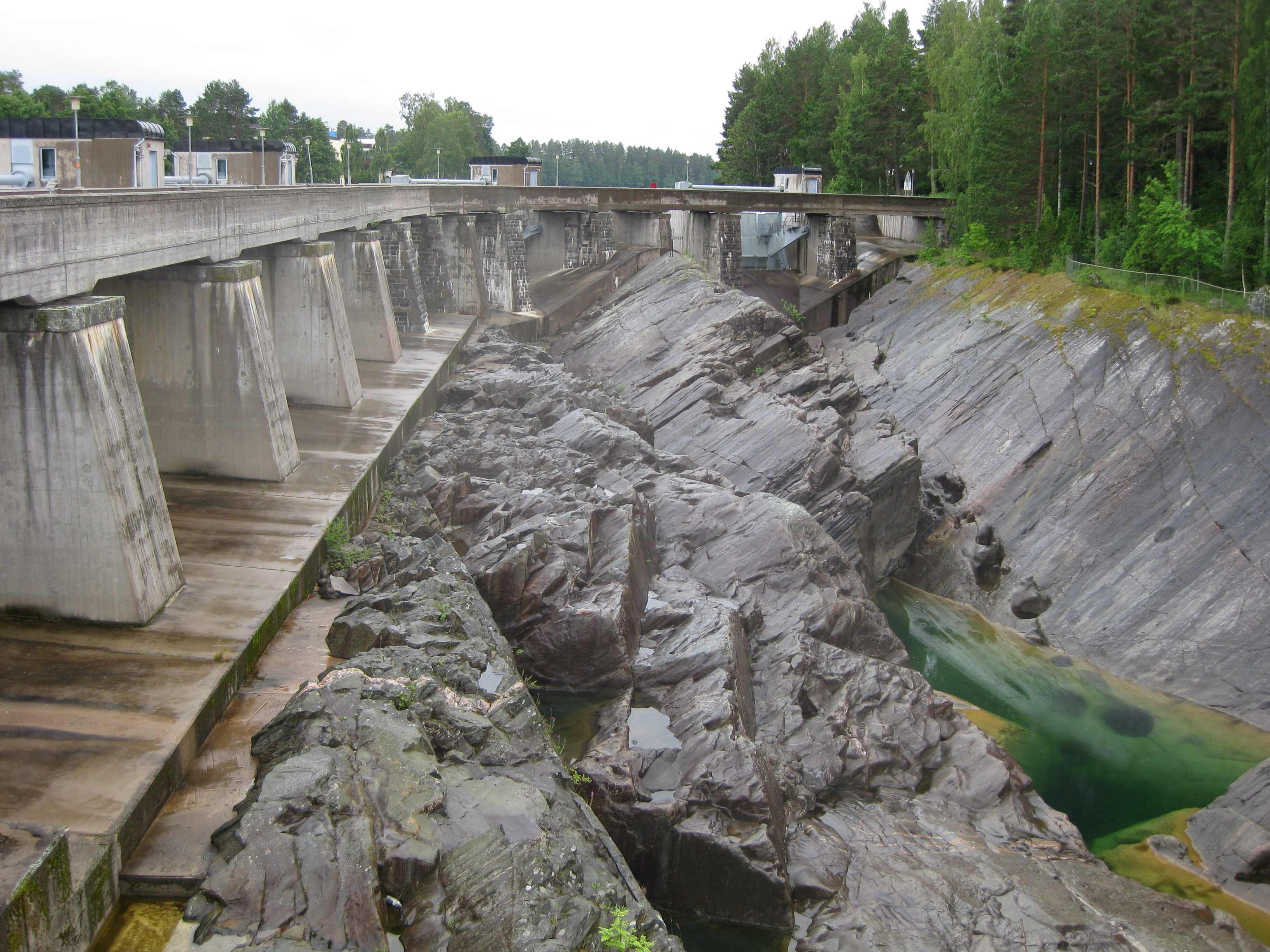 Det torrlagda vattenfallet i Älvklarleby